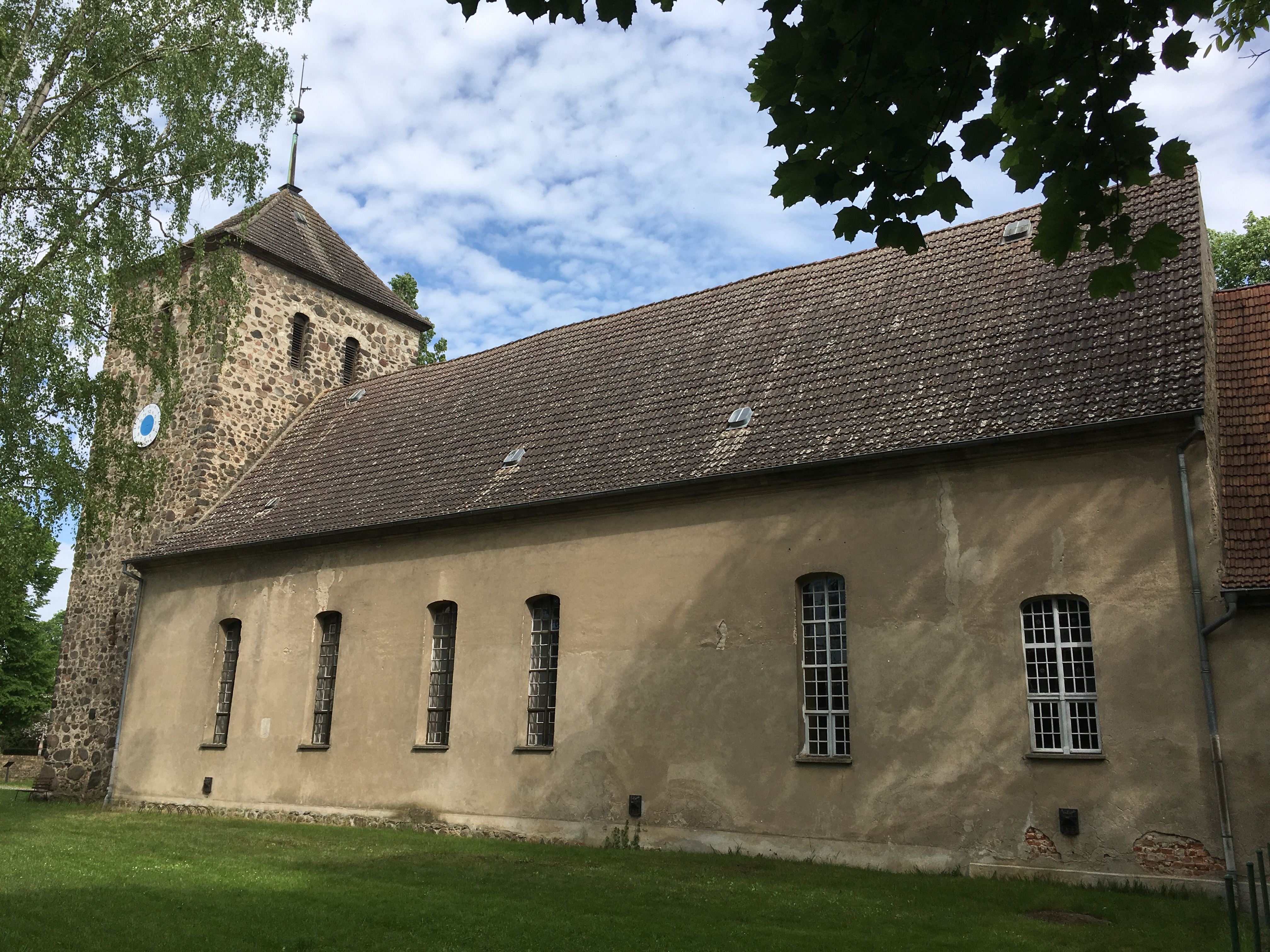 Die Hoffnungskirche in Rüdersdorf bei Berlin ist eine Feldsteinkirche aus dem 13. Jahrhundert, die 1718 und 1790 nach Osten hin erweitert wurde.